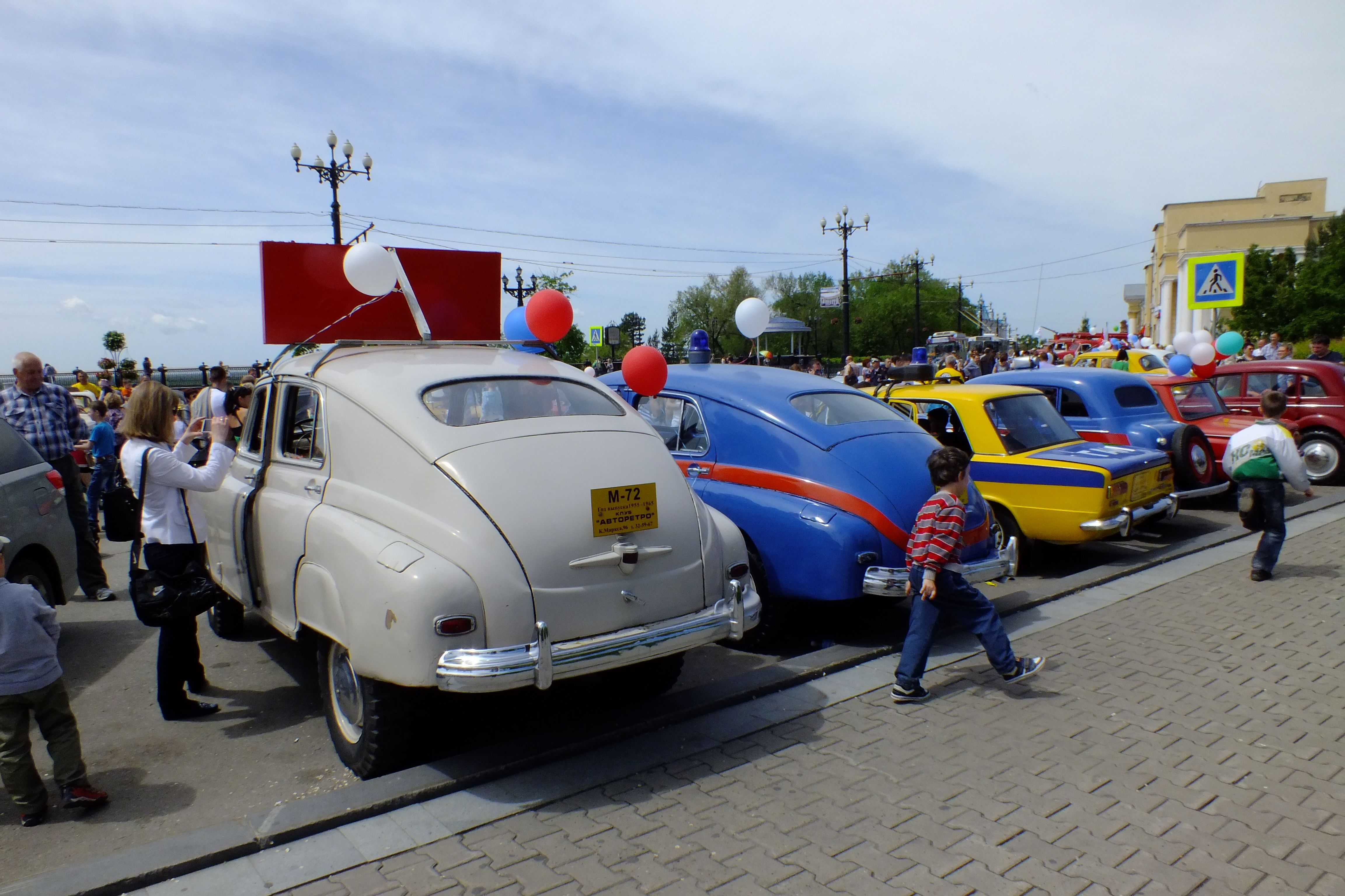 М72 и Победа М20